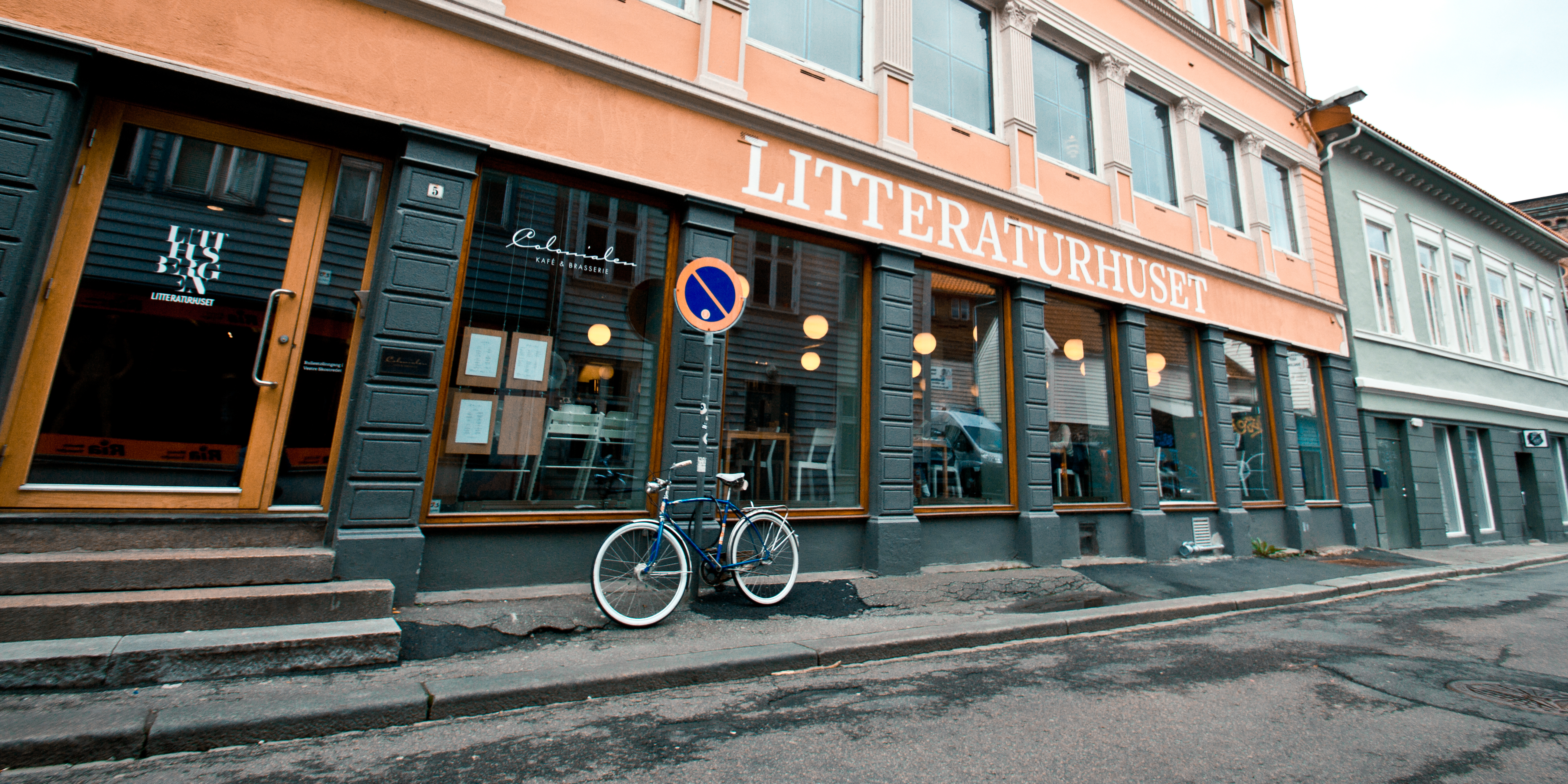 Bilde av fasaden.